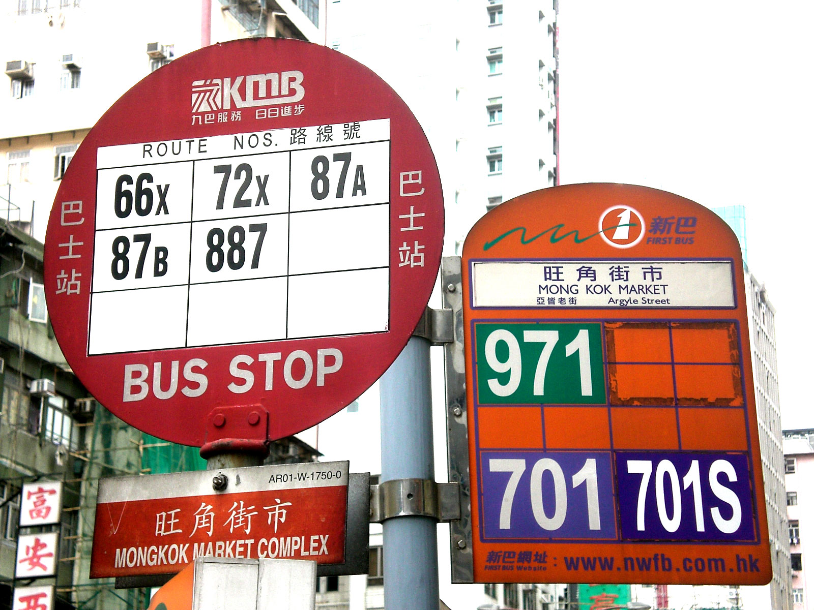 香港旺角街市巴士站